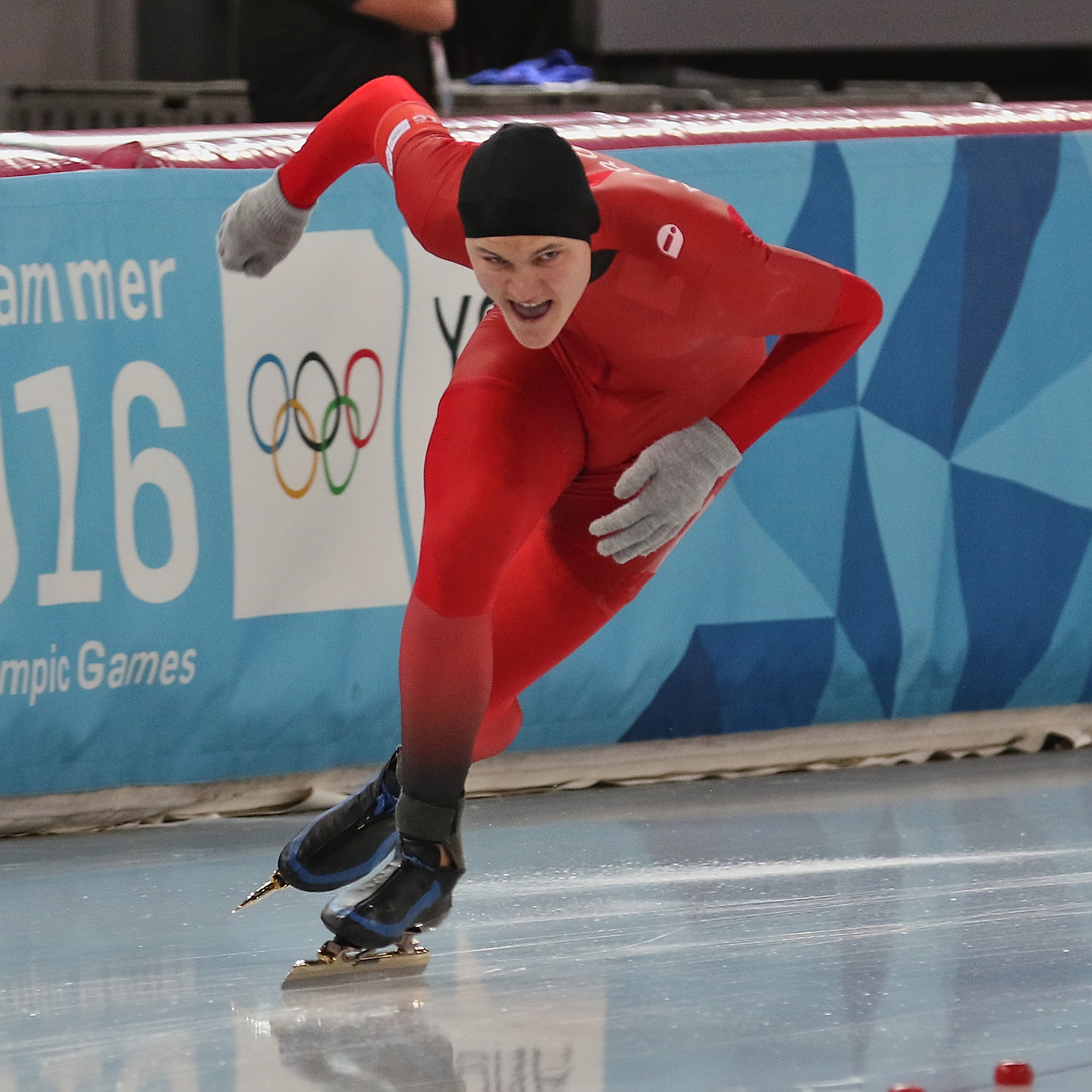 Lillehammer 2016 - Speed skating Men's 500m race 1 - Jonas Nordhoy Kristensen